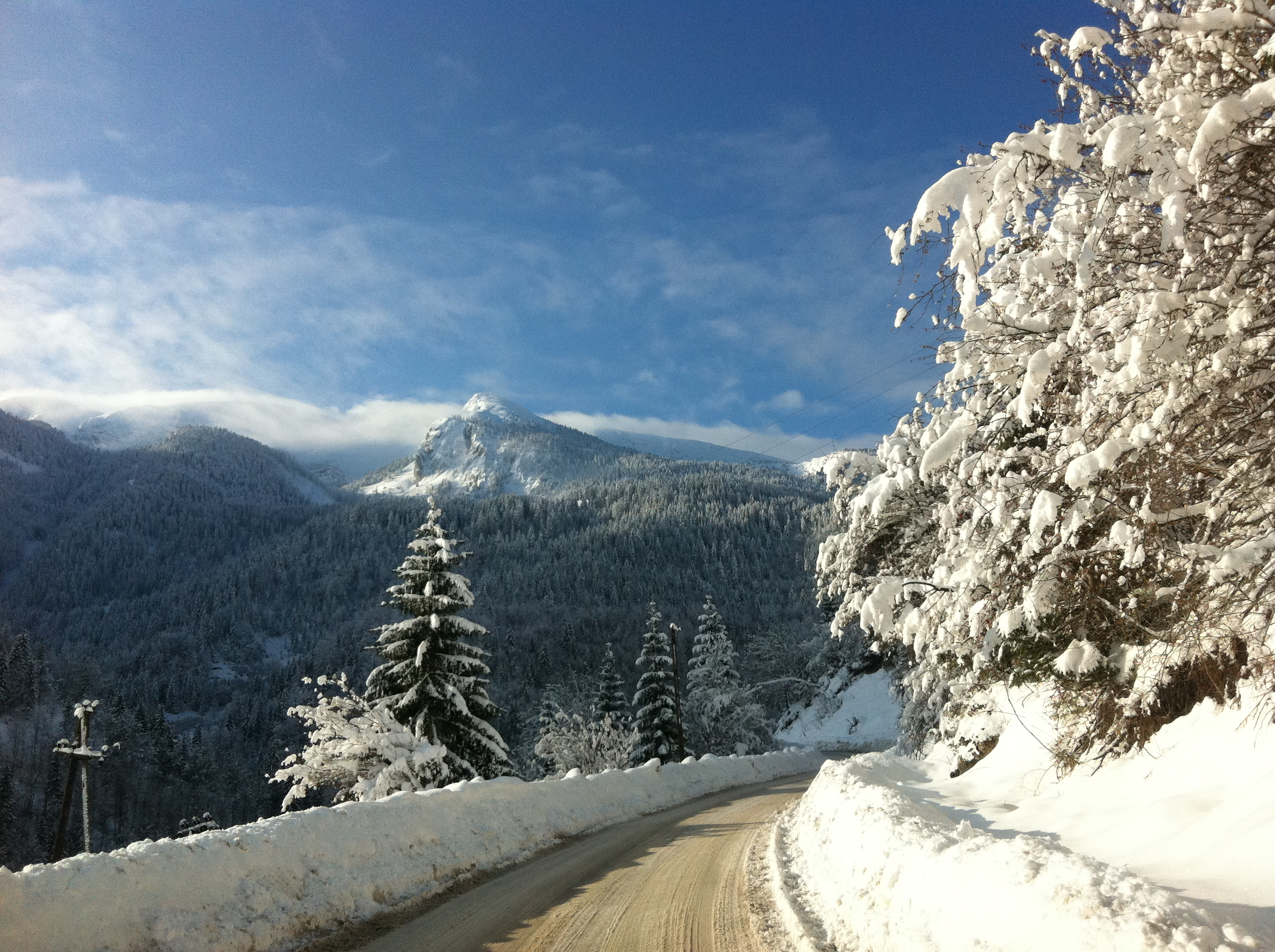 Rugove kosove boge peje